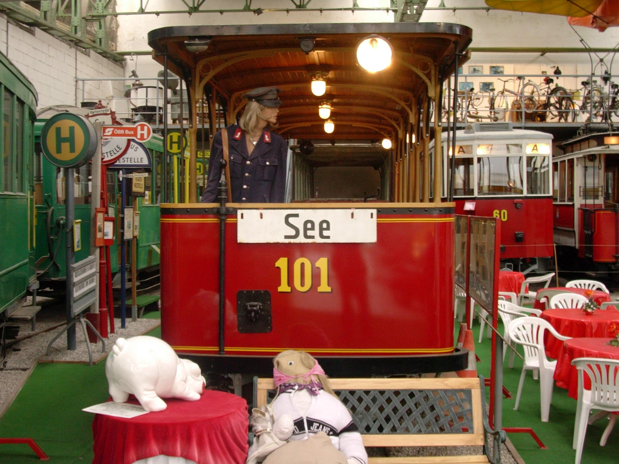 Beiwagen 101 der Straßenbahn Klagenfurt im Historama Ferlach